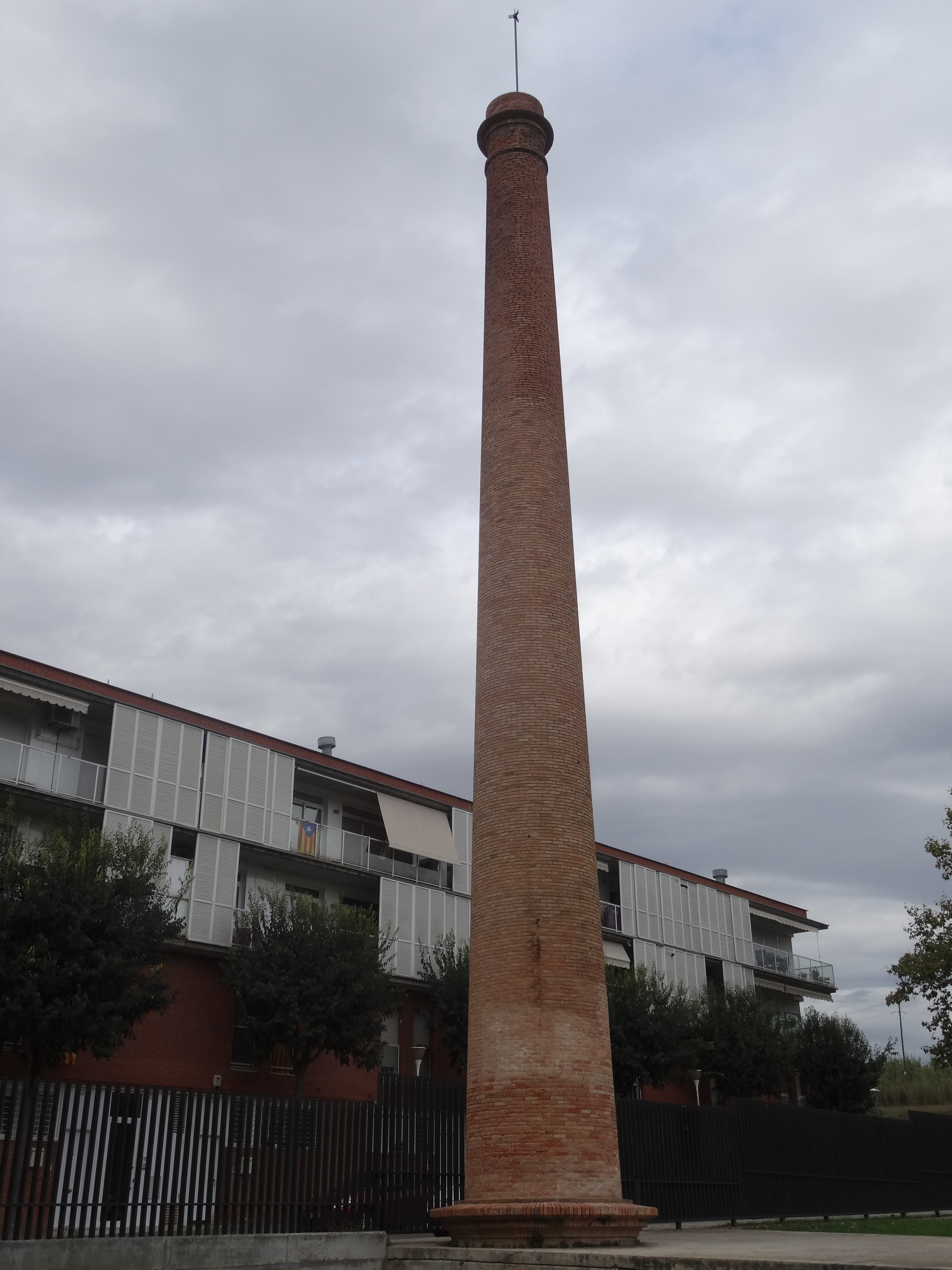 Xemeneia de 23 metres de l'antiga indústria tèxtil Linera, a l'actual parc La Linera, a Parets del Vallès La fàbrica tancà el 1971.